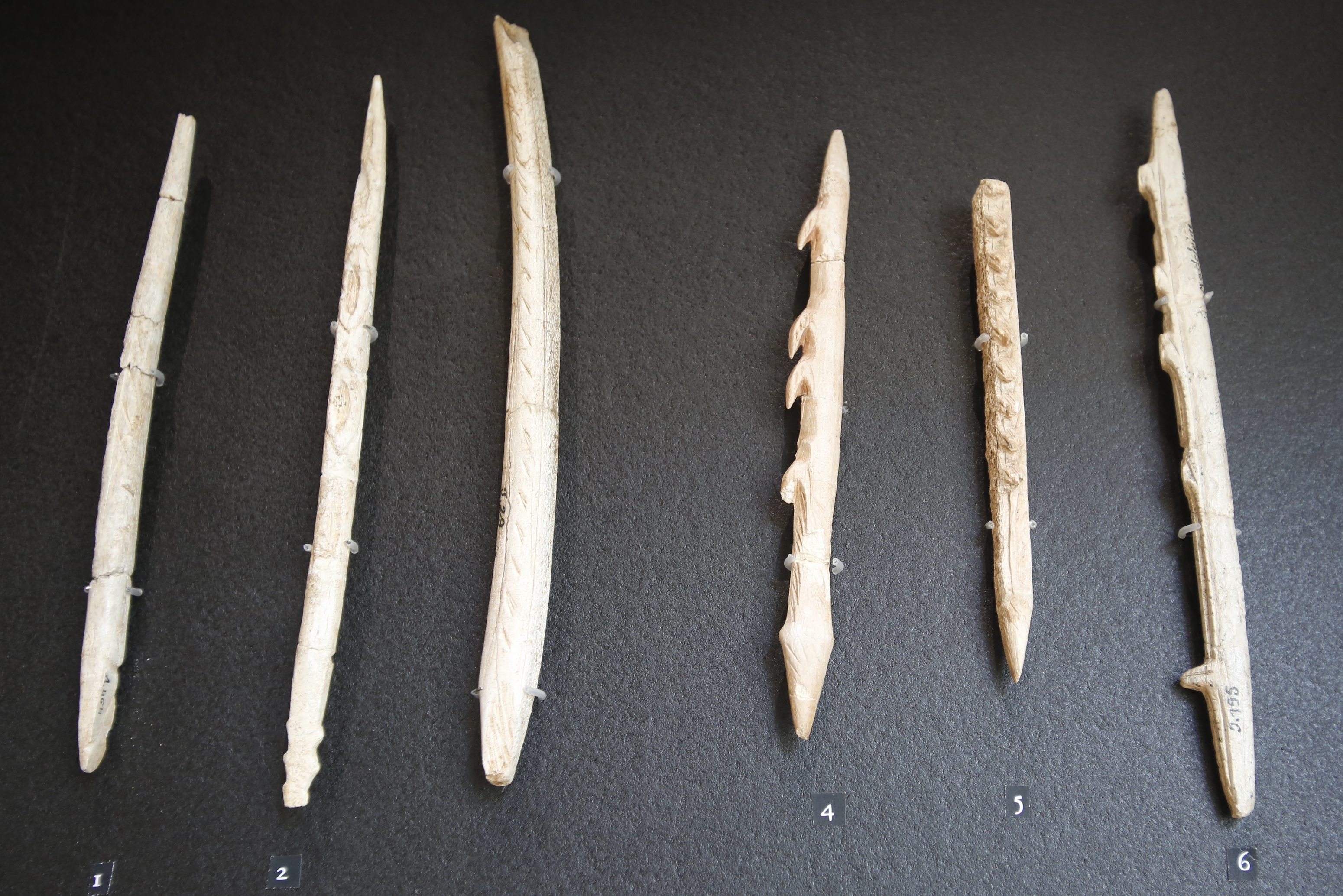 Musée national de Préhistoire aux Eyzies-de-Tayac-Sireuil : Pointes de sagaie et de harpon décorées du Magdalénien. Provenances : La Madeleine (n°1, 3 et 6), Fourneau-du-Diable (n°2), Les Marseilles (n°4 et 5).